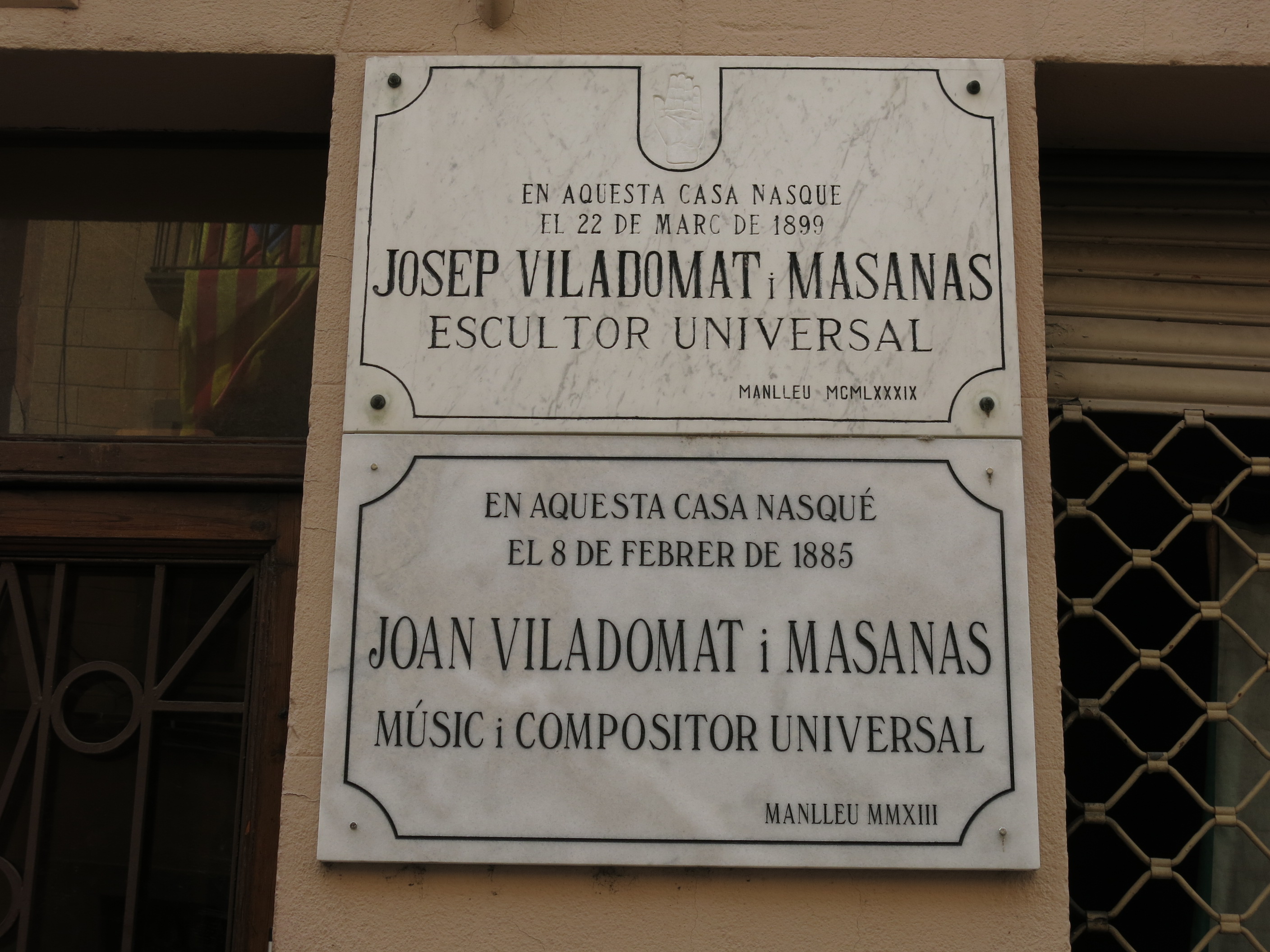 Creixement de la ciutat (Manlleu)